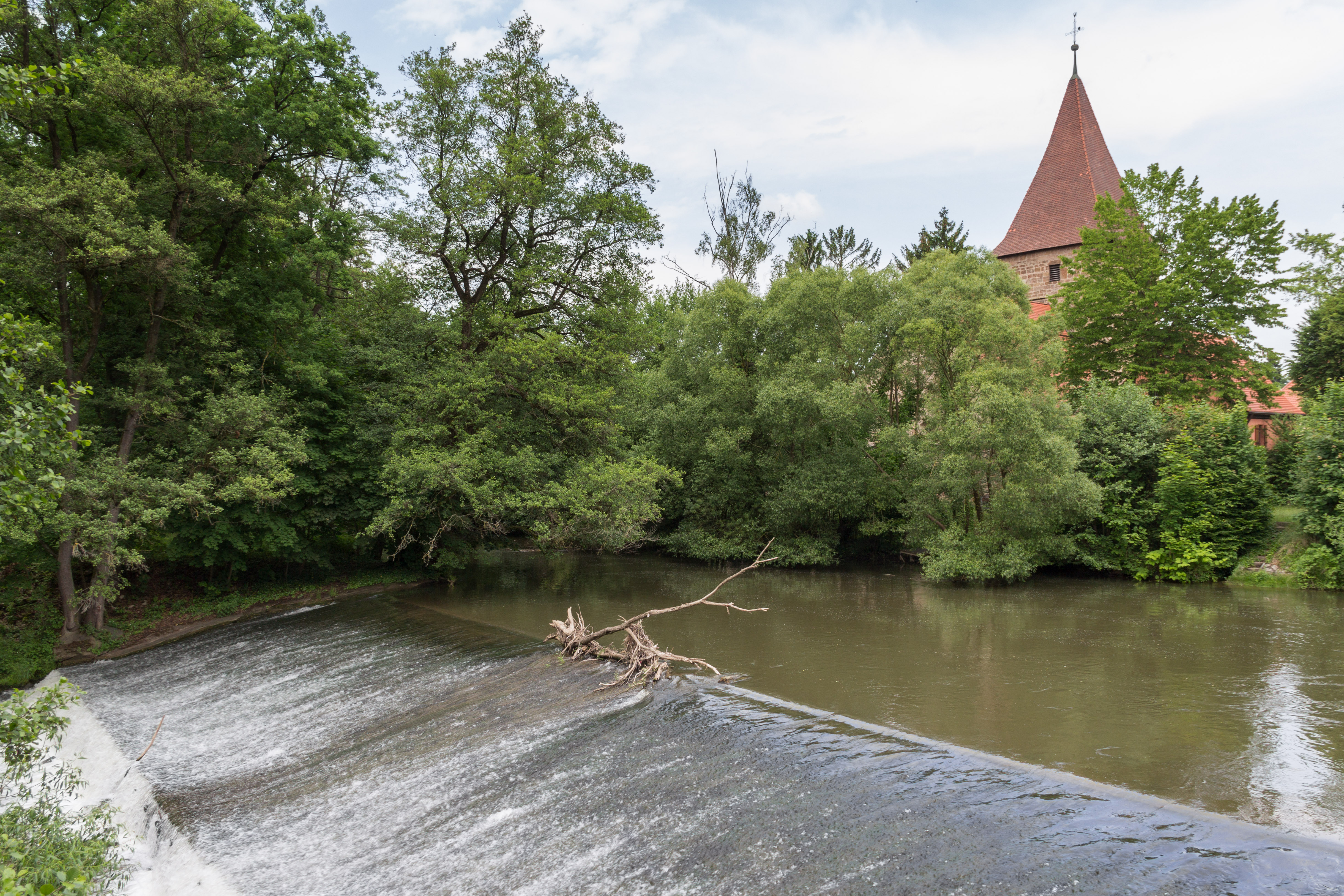 Rednitztal in Katzwang, Rednitzwehr, LSG Rednitztal - Süd, FFH-Gebiet Rednitztal in Nürnberg